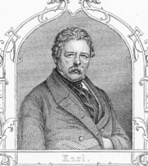 Karl Friedrich Ludwig von Schiller (1792-1857; ab 1845 Freiherr), ältester Sohn von Friedrich Schiller. Oberförster. Holzstich um 1860. "Bildgröße: ca. 80 x 72 mm. Rückseitig Text." (laut Quelle) Ausschnitt aus einem Stahstich von 1859. Teil der Beschreibung laut Quelle: "Schiller's Kinder. Carl. (...) Leop[old] Beyer sculps[it]. Druck aus der k. k. Hof- und Staats-Druckerei in Wien 1859. - Stahlstich in Schmuckrahmen, 25,3 x 17,8 cm." (Goethezeitportal, mit Verweis auf "Meyers Großes Konversations-Lexikon, 6. Aufl. 1905-1909; Bd. 17, S. 801; Digitale Bibliothek 100, S. 175406 f.; Auszug.")